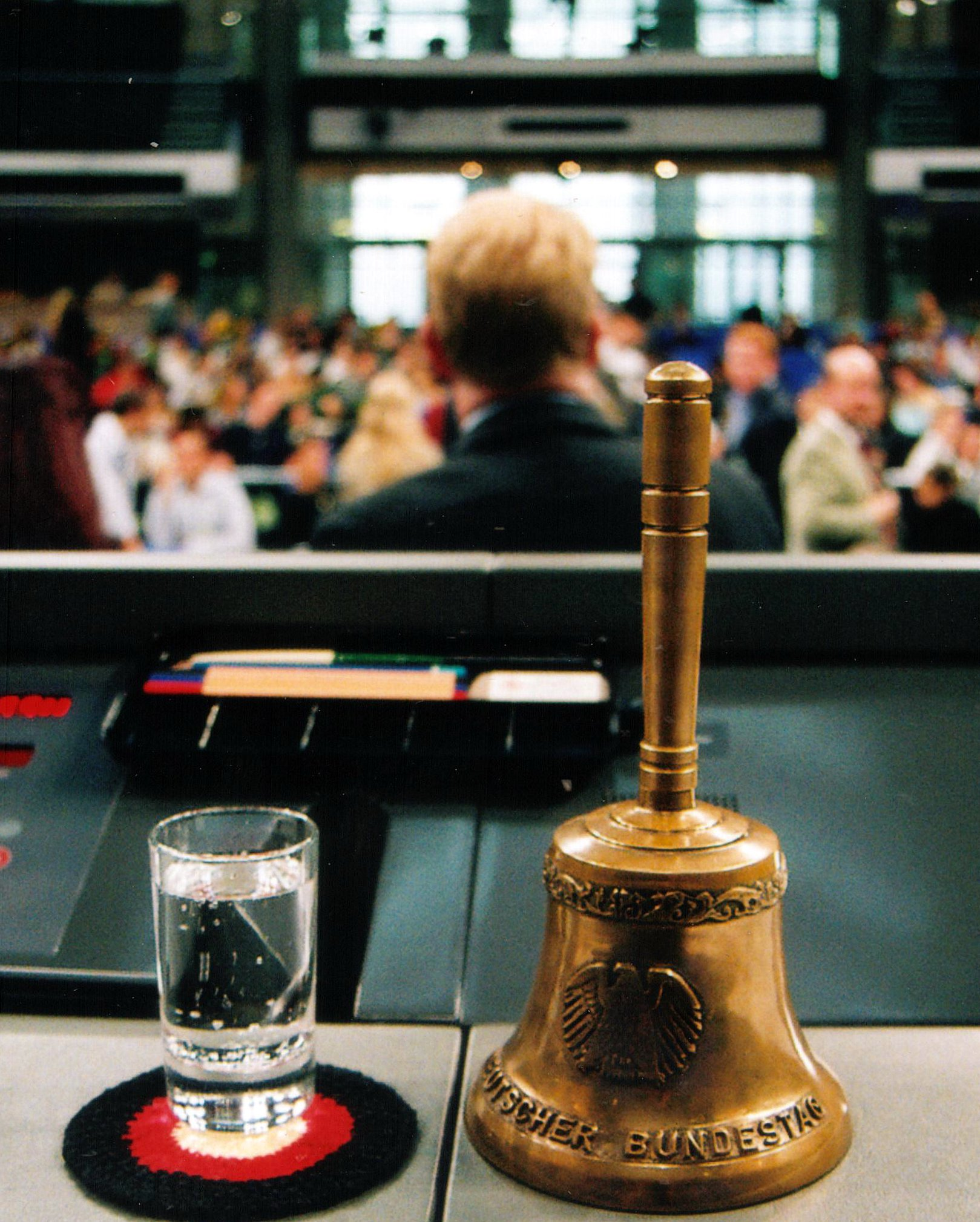 Arbeitsplatz des Bundestagspräsidenten im Plenarsaal mit Glocke und schwarz-rot-goldenem Glasuntersetzer. Selbst fotografiert. Lizenzen: GNU-FDL und CC 2.0 BY-SA (DE)